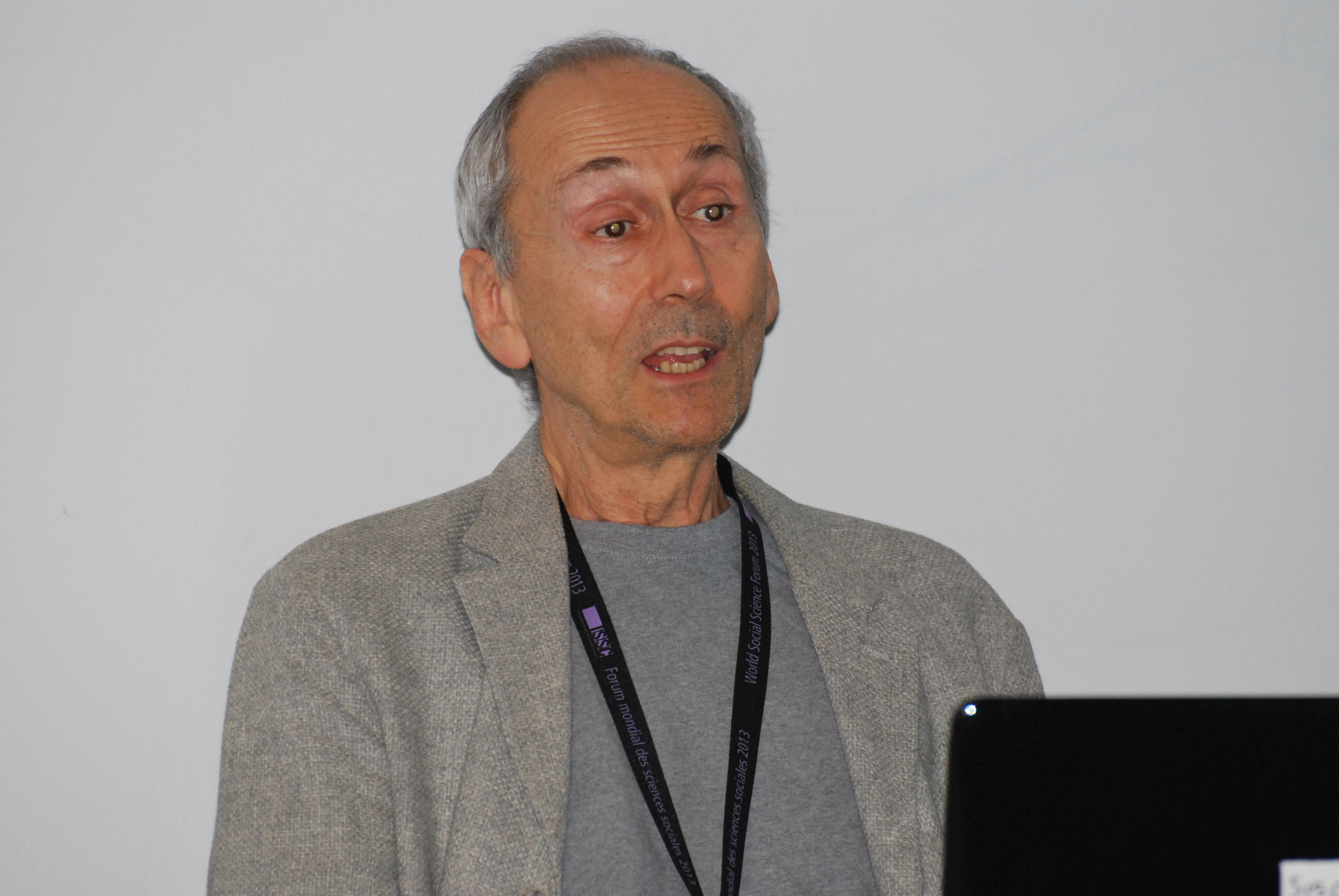 Stevan Harnard au forum international des sciences sociales 2013 à Montréal.